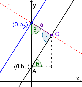 Растојание помеѓу паралелни прави